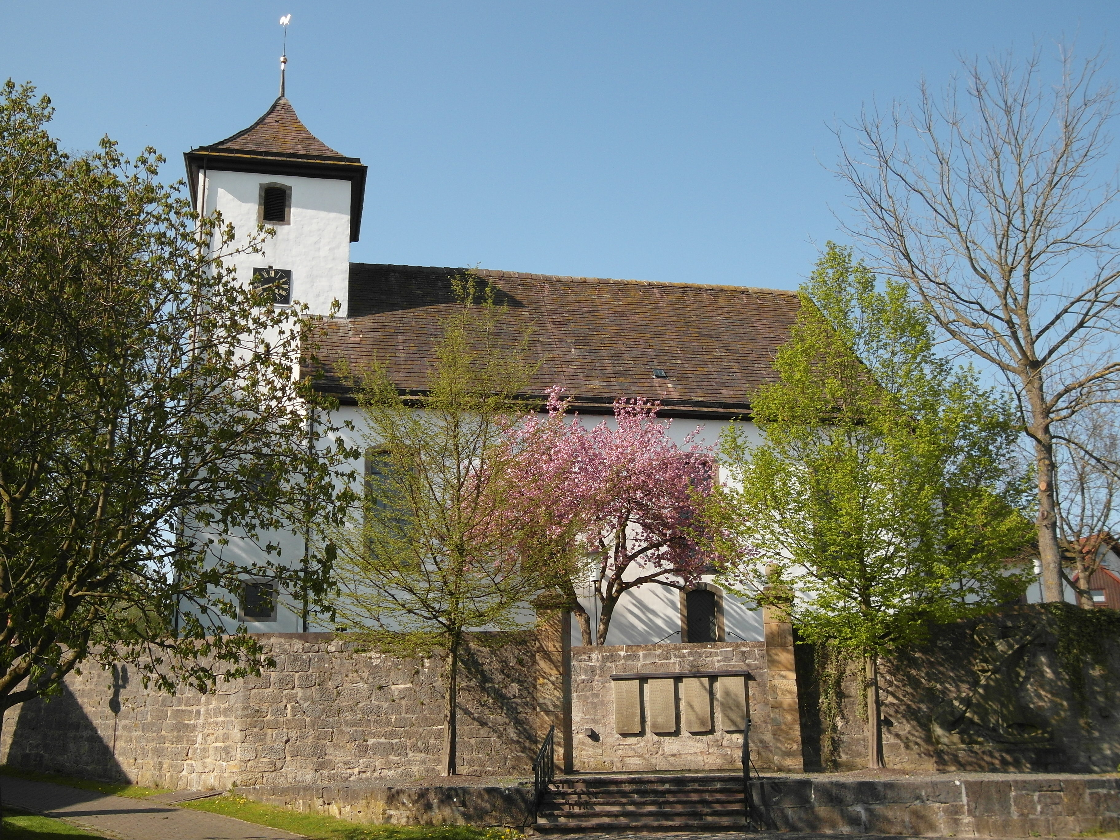 Dieses Foto zeigt die Gesamtansicht der Südseite der St. Meinolf Kirche in Bellersen (Brakel). This is a photograph of an architectural monument.